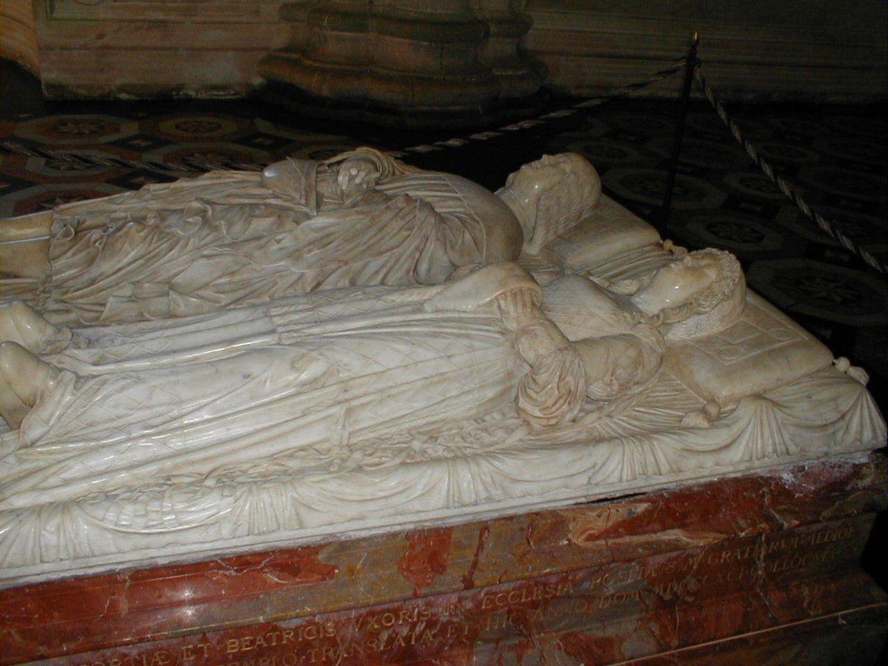 Il cenotafio di Ludovico il Moro e di sua moglie Beatrice d'Este.